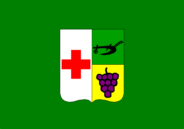 Bandeira do município de Colombo